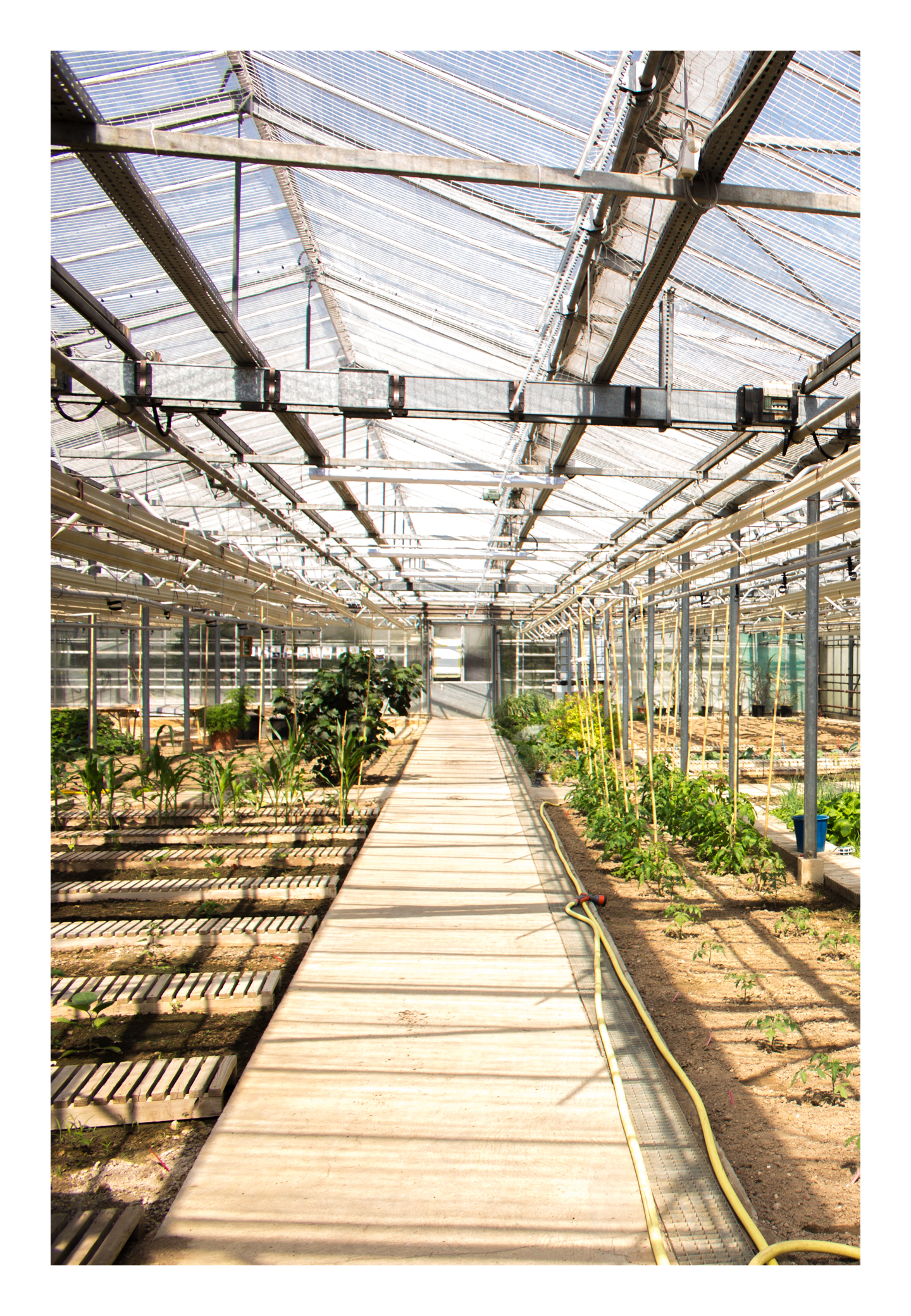 Photographie des serres de campus de l'UFR sciences. Prises de vue intérieure depuis l'allée centrale (perspective). Hauteur d'homme, légère plongée.